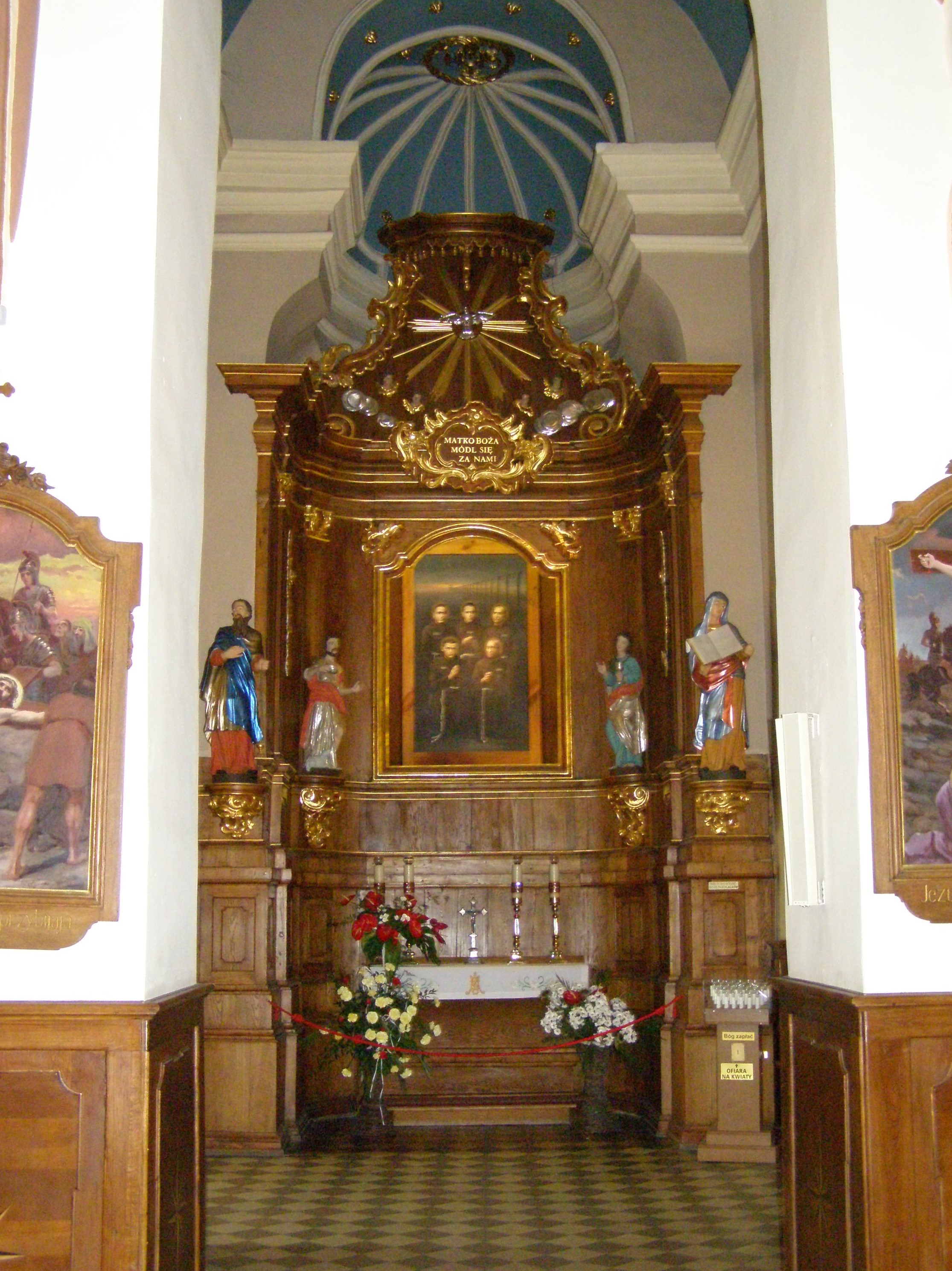 Kościół Wszystkich Świętych we Włocławku - ołtarz męczenników franciszkańskich (Anastazy Pankiewicz, Brunon Zembol, Marcin Oprządek, Narcyz Turchan, Krystyn Gondek)